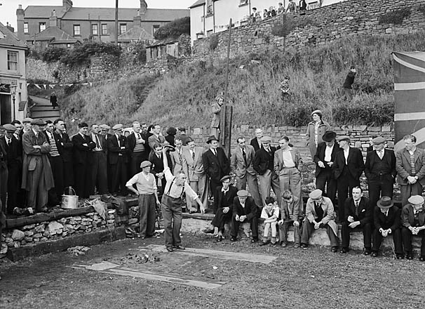 Teitl Cymraeg/Welsh title: Adfywio coetennau ym Merthyr Tudful Ffotograffydd/Photographer: Geoff Charles (1909-2002) Nodyn/Note: Dyddiad/Date: 14/9/1951 Cyfrwng/Medium: Negydd ffilm / Film negative Cyfeiriad/Reference: (gch02179) Rhif cofnod / Record no.: 3368266 Rhagor o wybodaeth am gasgliad Geoff Charles yn Llyfrgell Genedlaethol Cymru More information about the Geoff Charles Collection at the National Library of Wales Mae ffotograffau Geoff Charles hefyd yn rhan o Broject Europeana Libraries Geoff Charles' photographs also form part of the Europeana Libraries Project